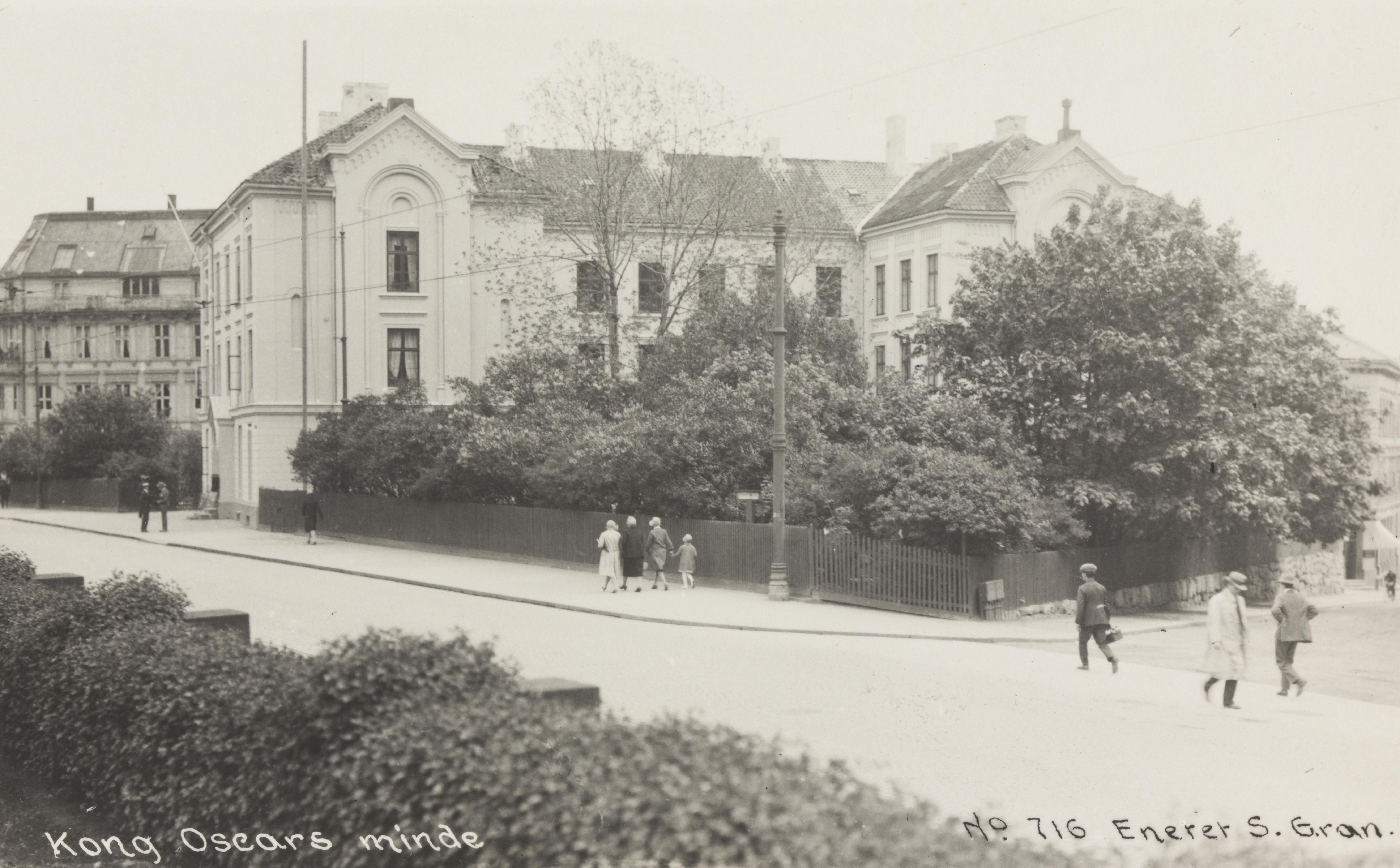 Bildet er hentet fra Nasjonalbibliotekets bildesamling Oslo, Oslo